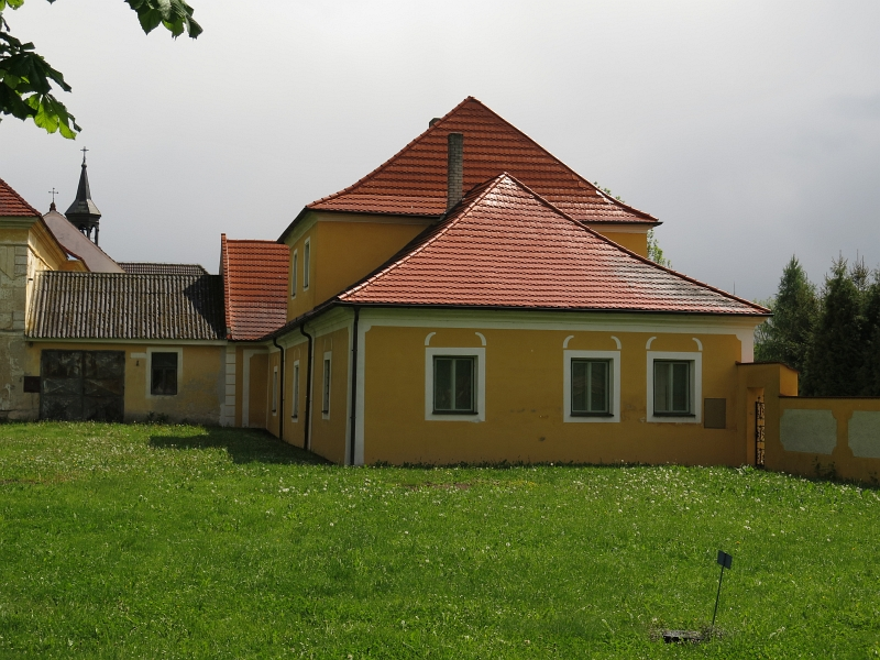 Fara, Zálší 37, Zálší (okres Tábor).